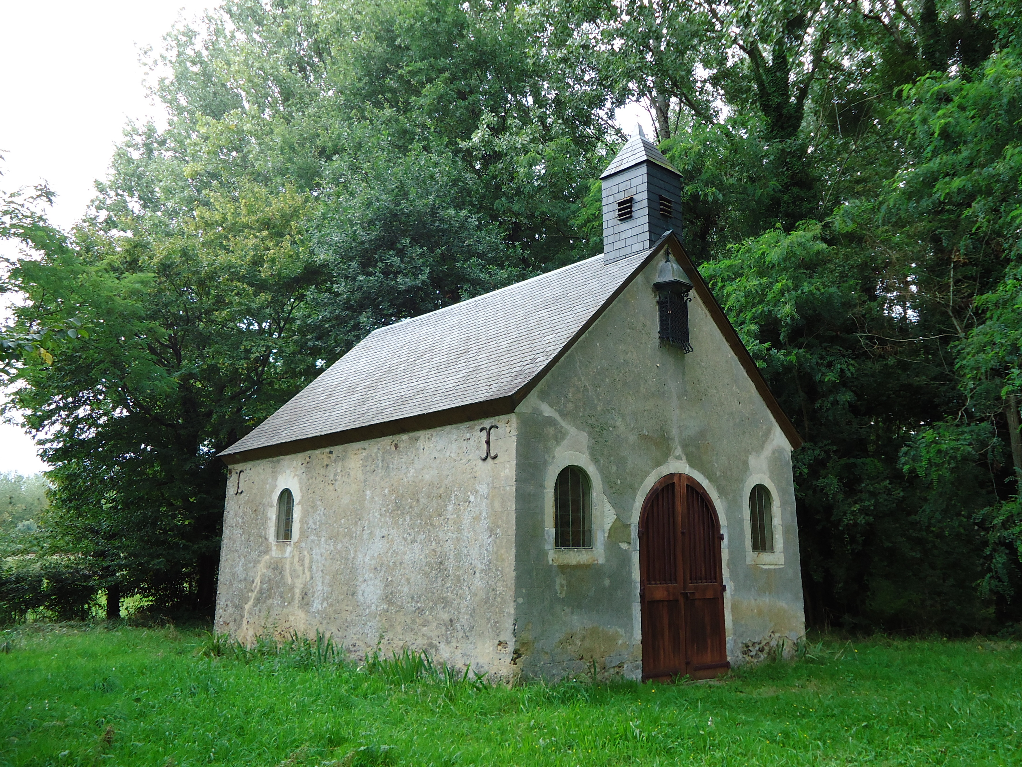 Chapelle Notre-Dame-des-Bois - Moncé-en-Belin - Sarthe (72)